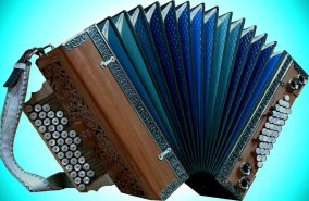 Diatonische Harmonika mit erweiterten Bässen